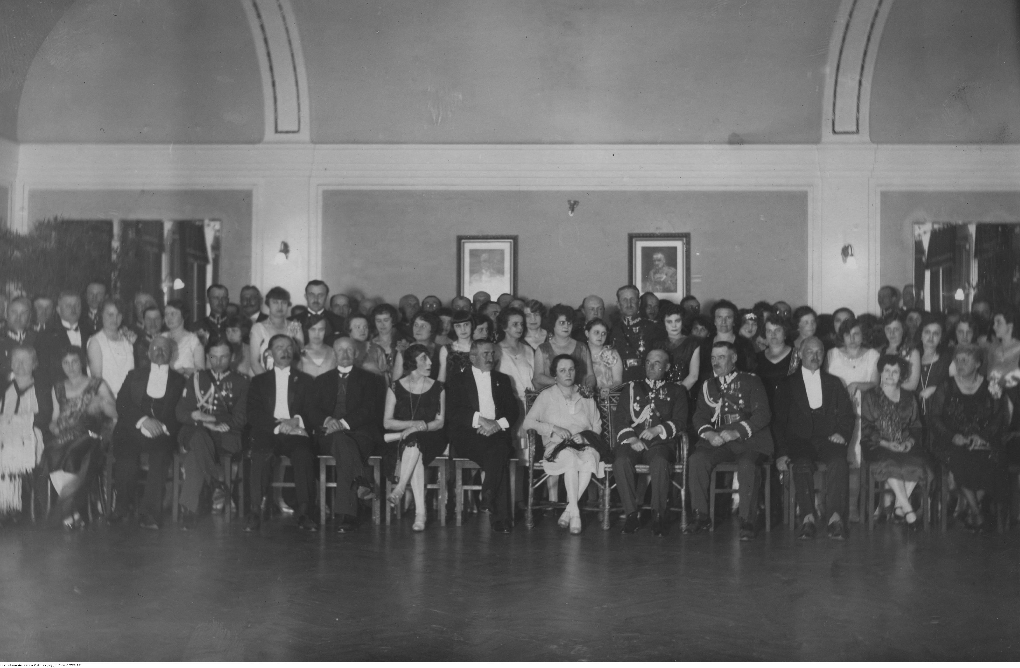 Święto 51 Pułku Piechoty Strzelców Kresowych w Brzeżanach. Fotografia grupowa uczestników rautu wydanego przez korpus oficerski pułku 27 maja 1928. Widoczni m.in. gen. Edward Rydz-Śmigły (siedzi 5 z prawej), gen. Bolesław Popowicz (siedzi 4 z prawej), płk Eugeniusz Zabawski (stoi za gen. Rydzem-Śmigłym). Koncern Ilustrowany Kurier Codzienny - Archiwum Ilustracji. Sygnatura: 1-W-1252-12